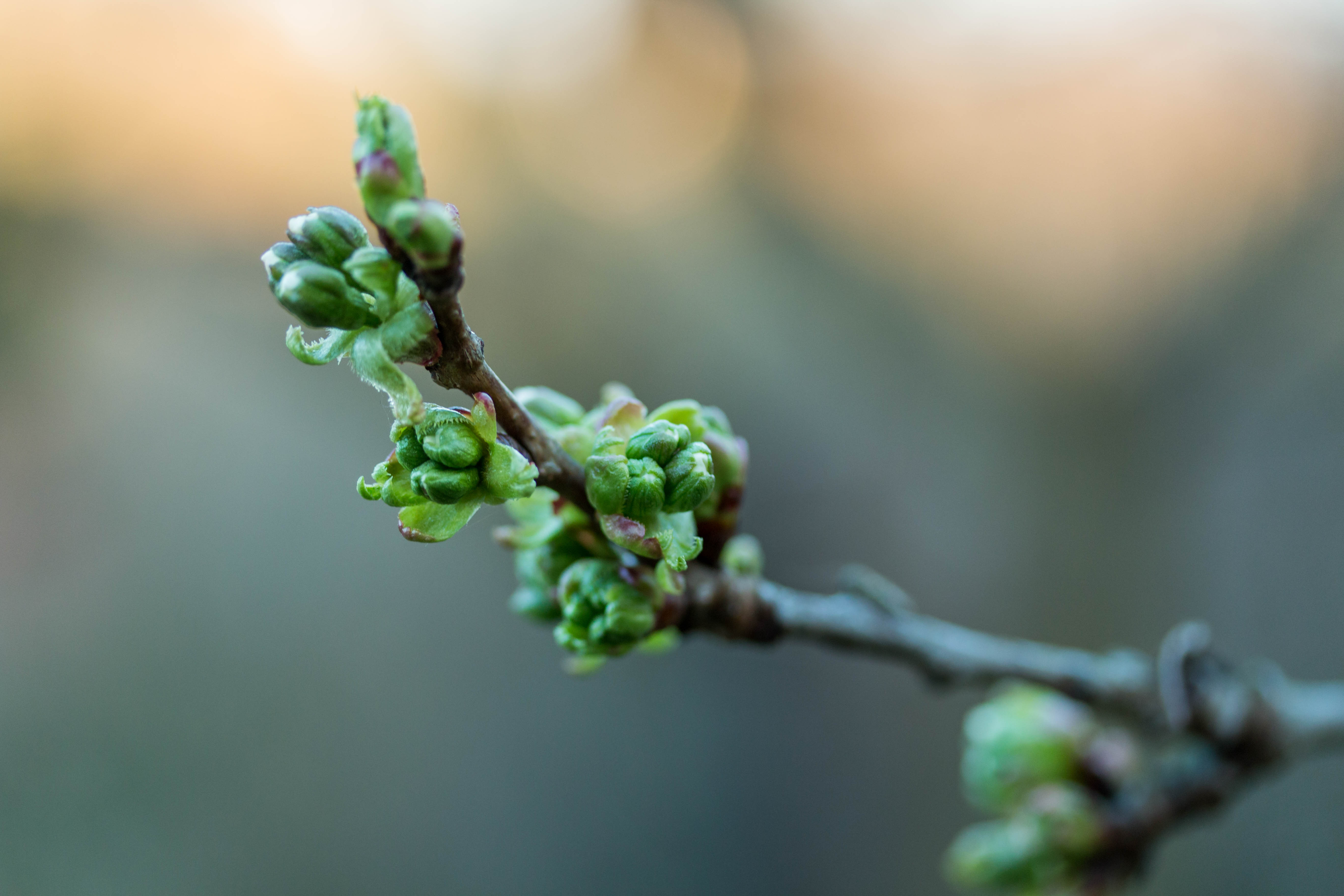 Kirscheknospen